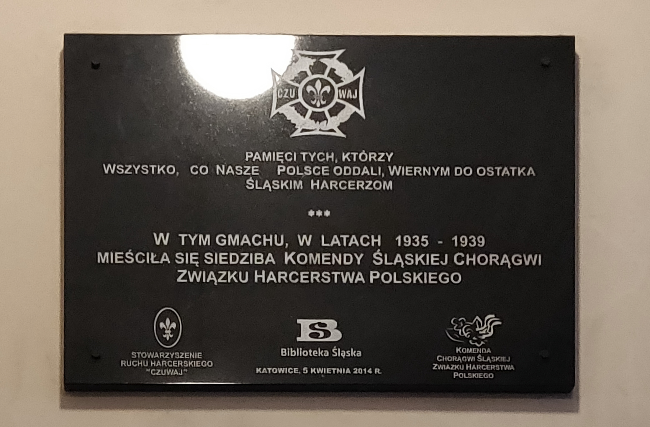 We wnętrzu budynku przy ul. Francuskiej 12 w Katowicach w 2014 odsłonięto tablicę, poświęconą Komendzie Śląskiej Chorągwi ZHP, która mieściła się w tym gmachu w latach 1935–1939.